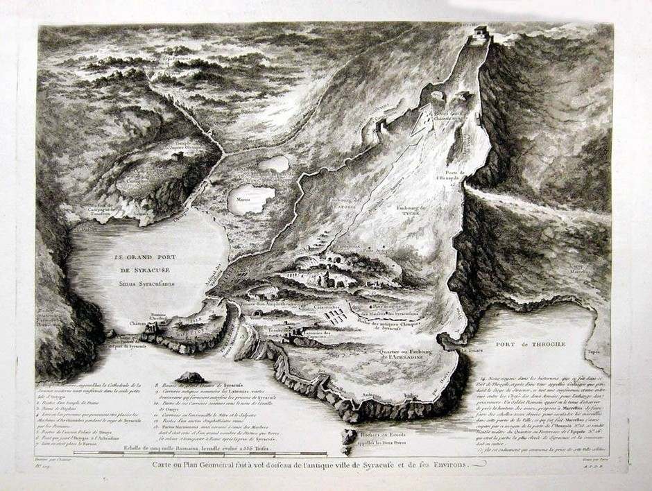 Mappa dell'antica Siracusa; incisione all'acquaforte disegnata da Claude Louis Chatelet e incisa da Pierre-Adrien Pâris.